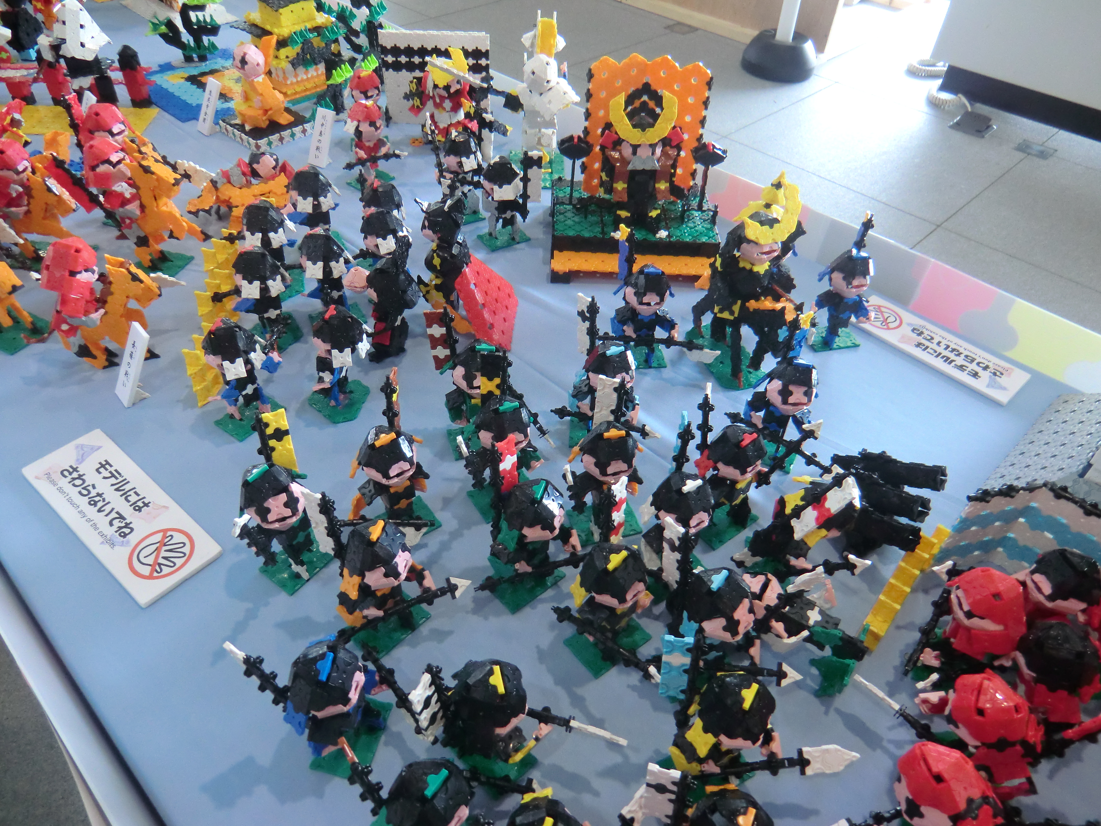 LaQ 歴史絵巻ジオラマ (LaQ Festa in Nara 2013)